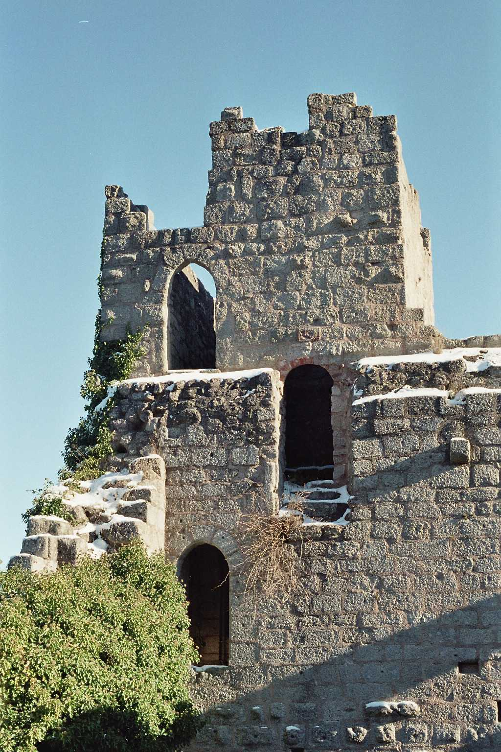 Château du Bernstein, près de Dambach-la-ville, dans le Bas-Rhin.